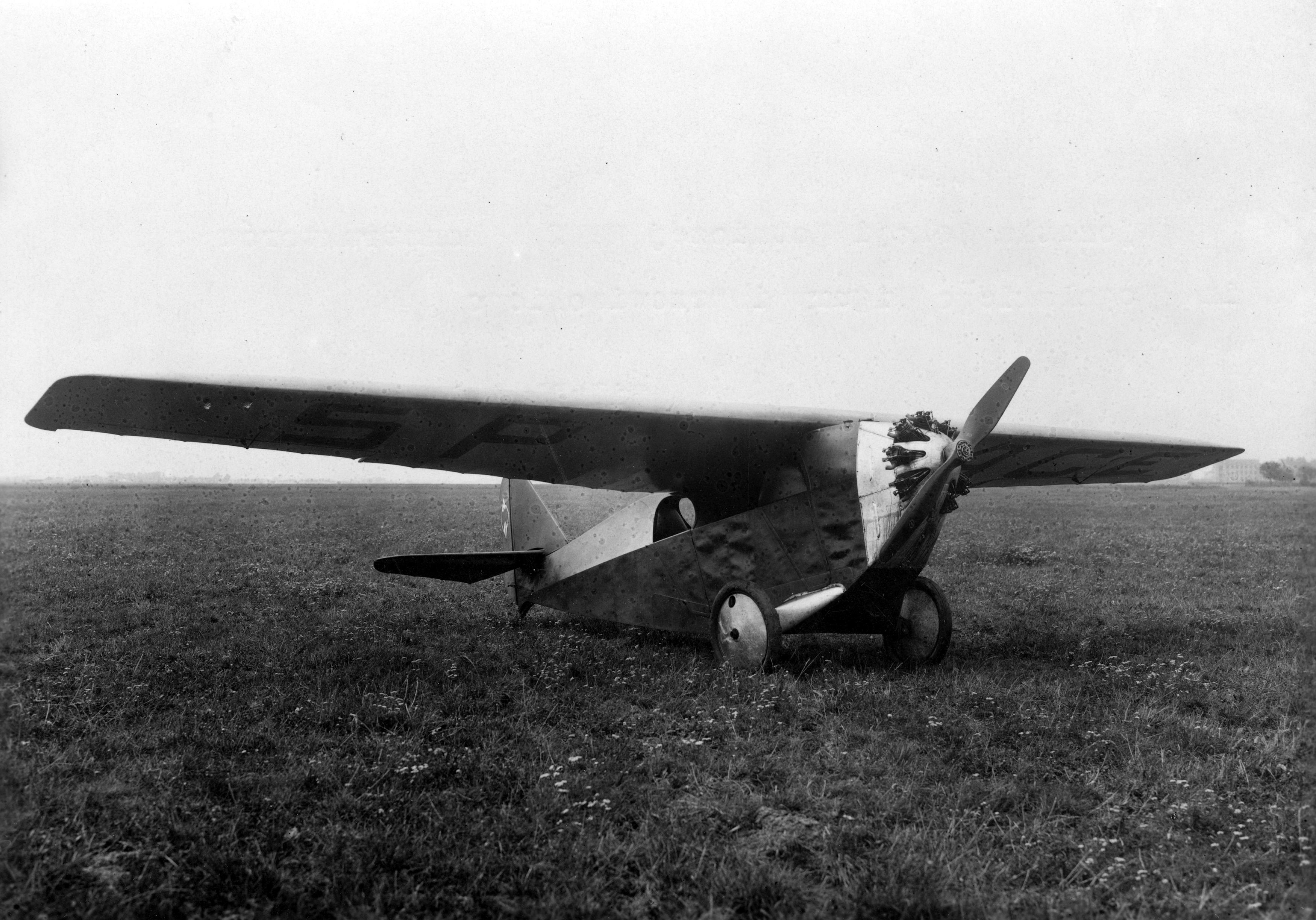 Samolot RWD 2 konstrukcji inżynierów Stanisława Rogalskiego, Stanisława Wigury i Jerzego Drzewieckiego - sylwetka samolotu.